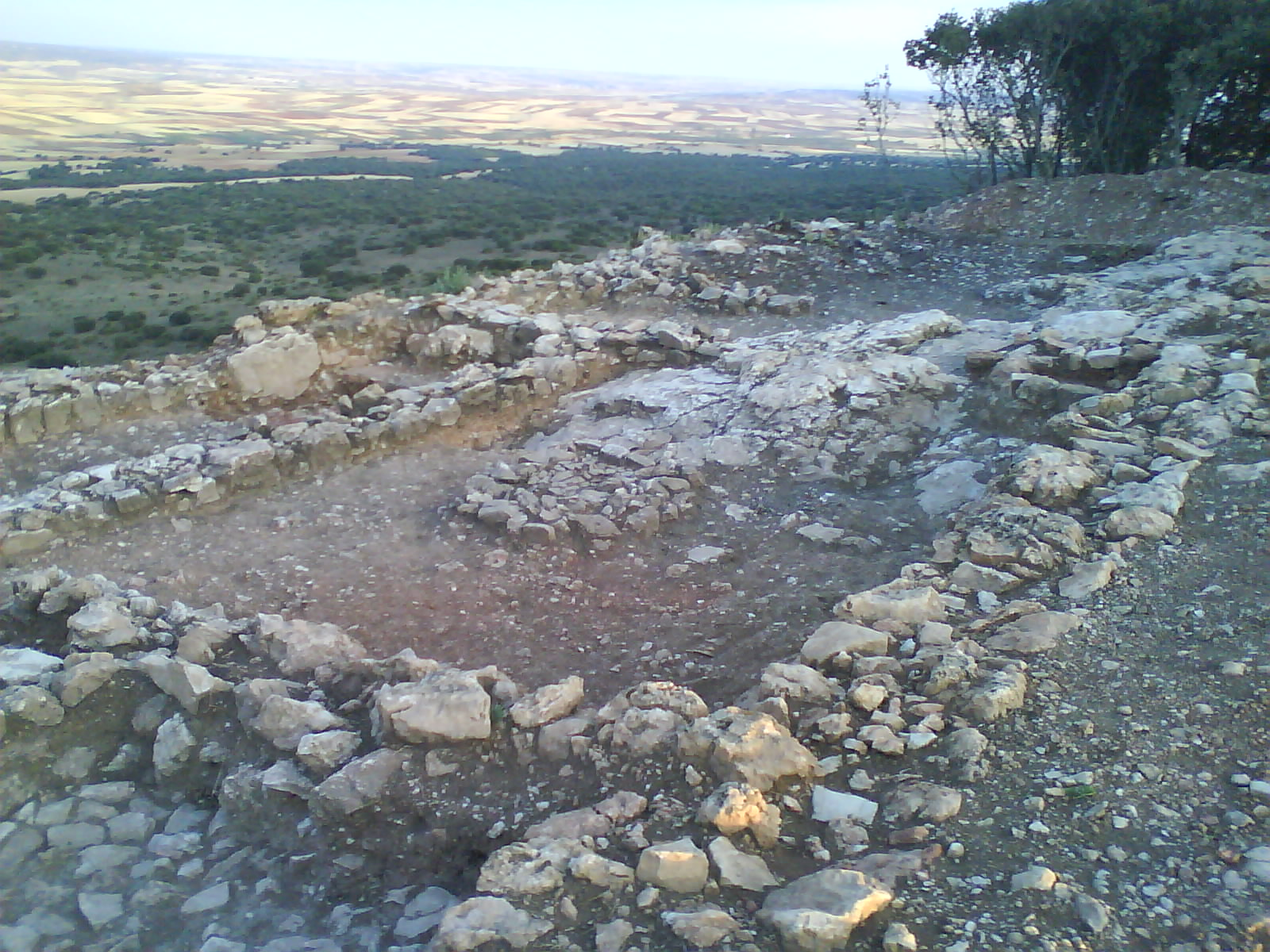 Castro celtibérico en el cerro de la Cruz